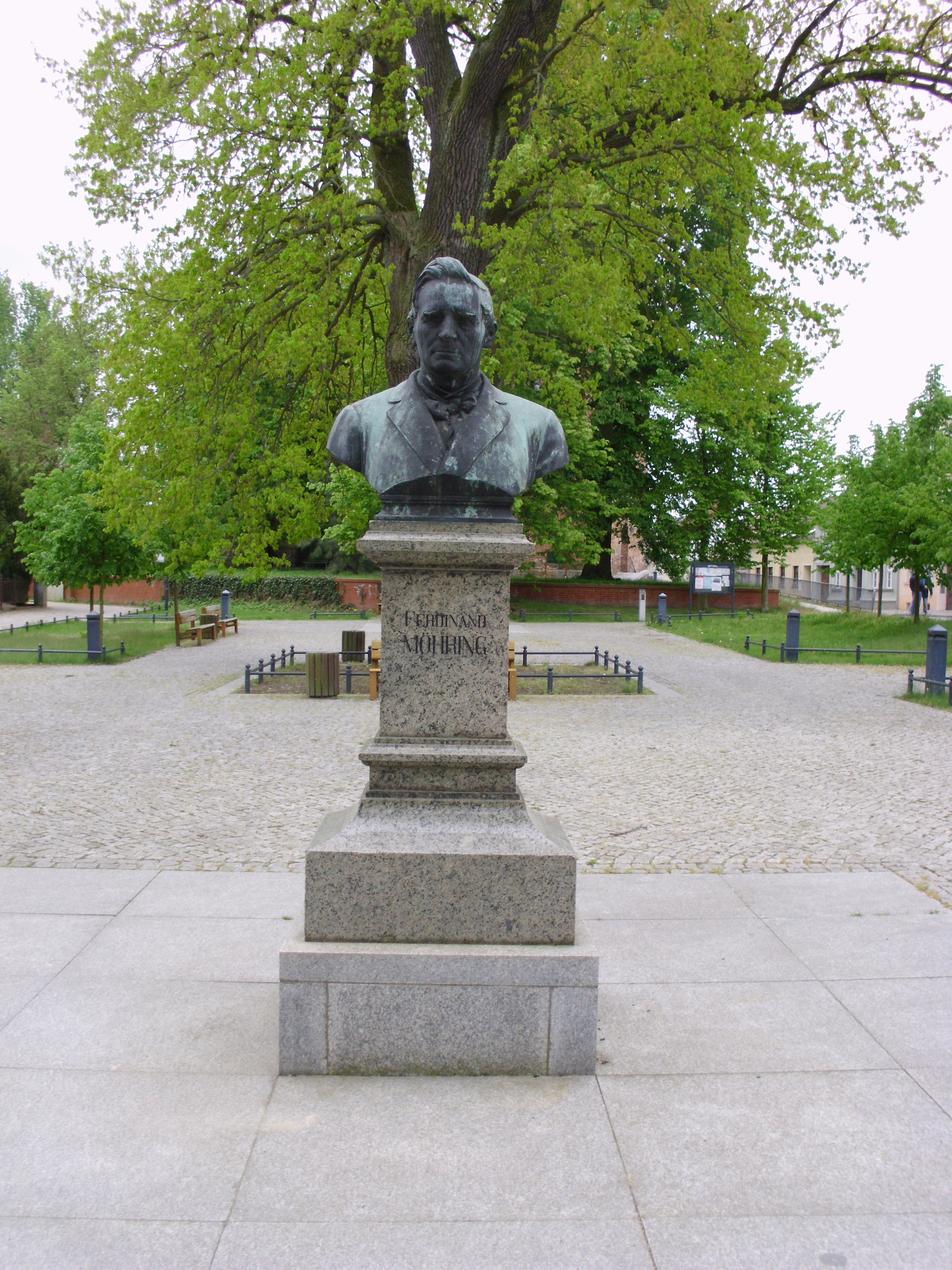 Ferdinand Möhring (1816-1887), deutscher Komponist, Lieddichter, Dirigent und Organist, Denkmal in Alt Ruppin, Ortsteil von Neuruppin in Brandenburg, Deutschland